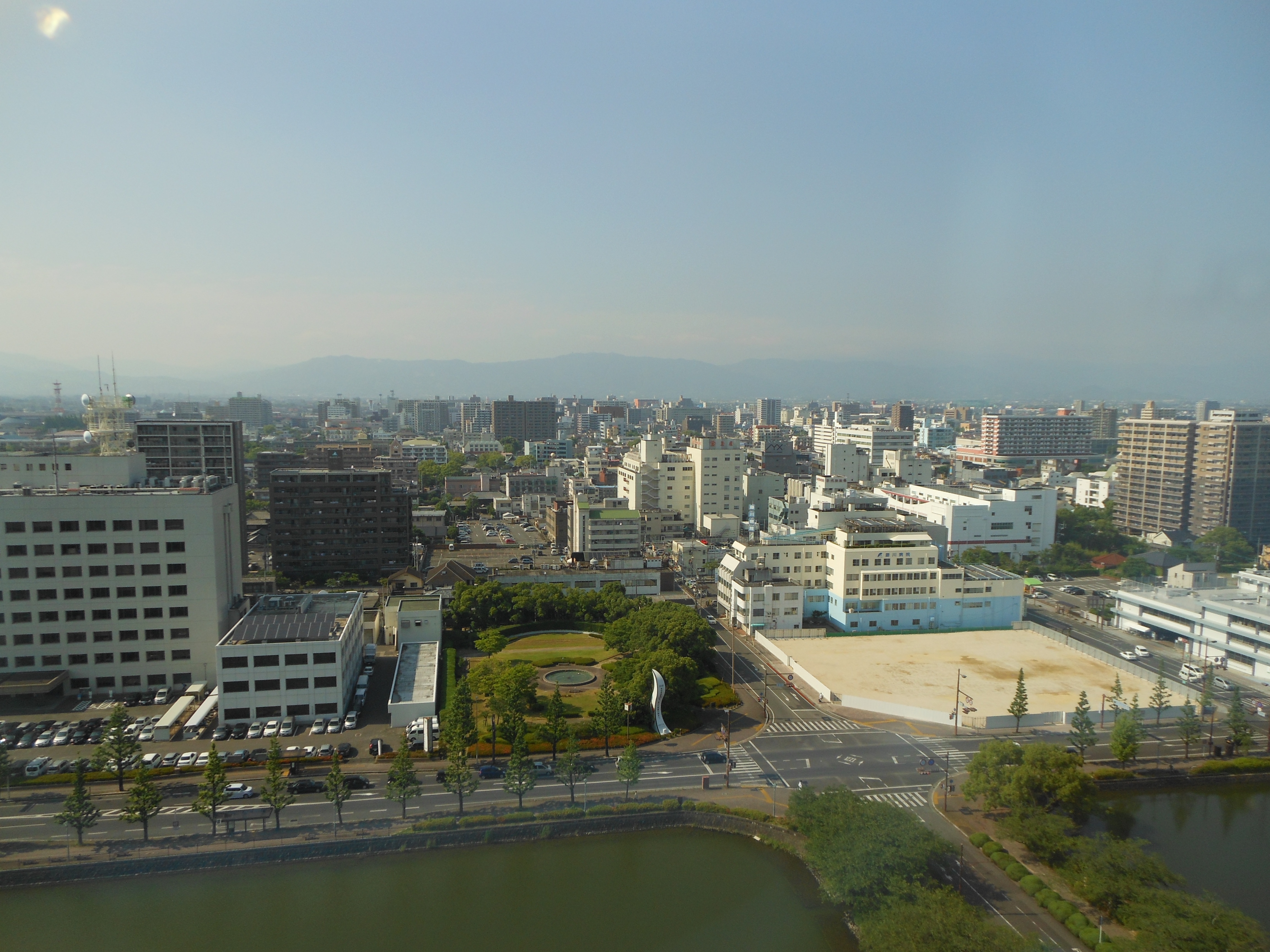 佐賀市中心部の遠景。佐賀県庁屋上展望台より北側、中央大通り・佐賀駅方向を望む。